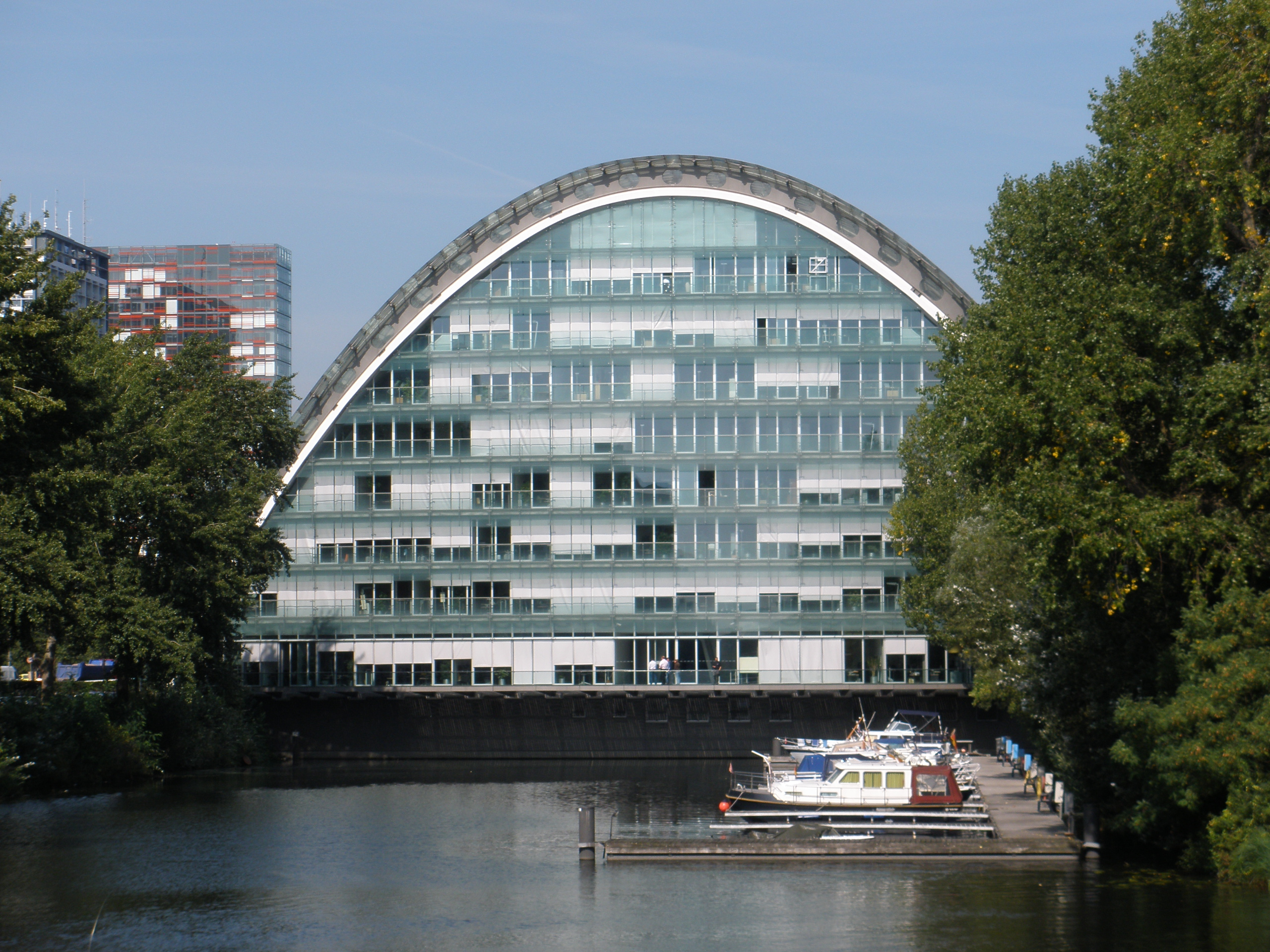 berliner bogen vom rückhaltebecken aus gesehen, Hamburg-hammerbrook